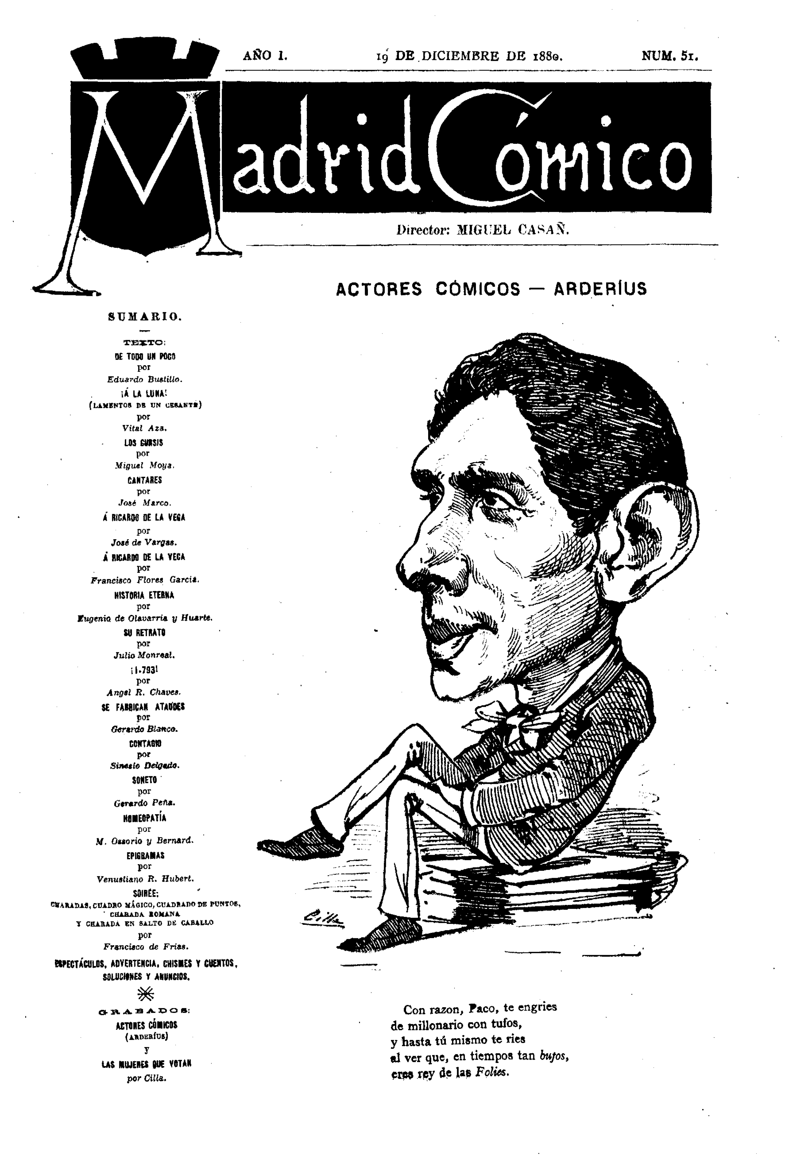 Francisco Arderius.